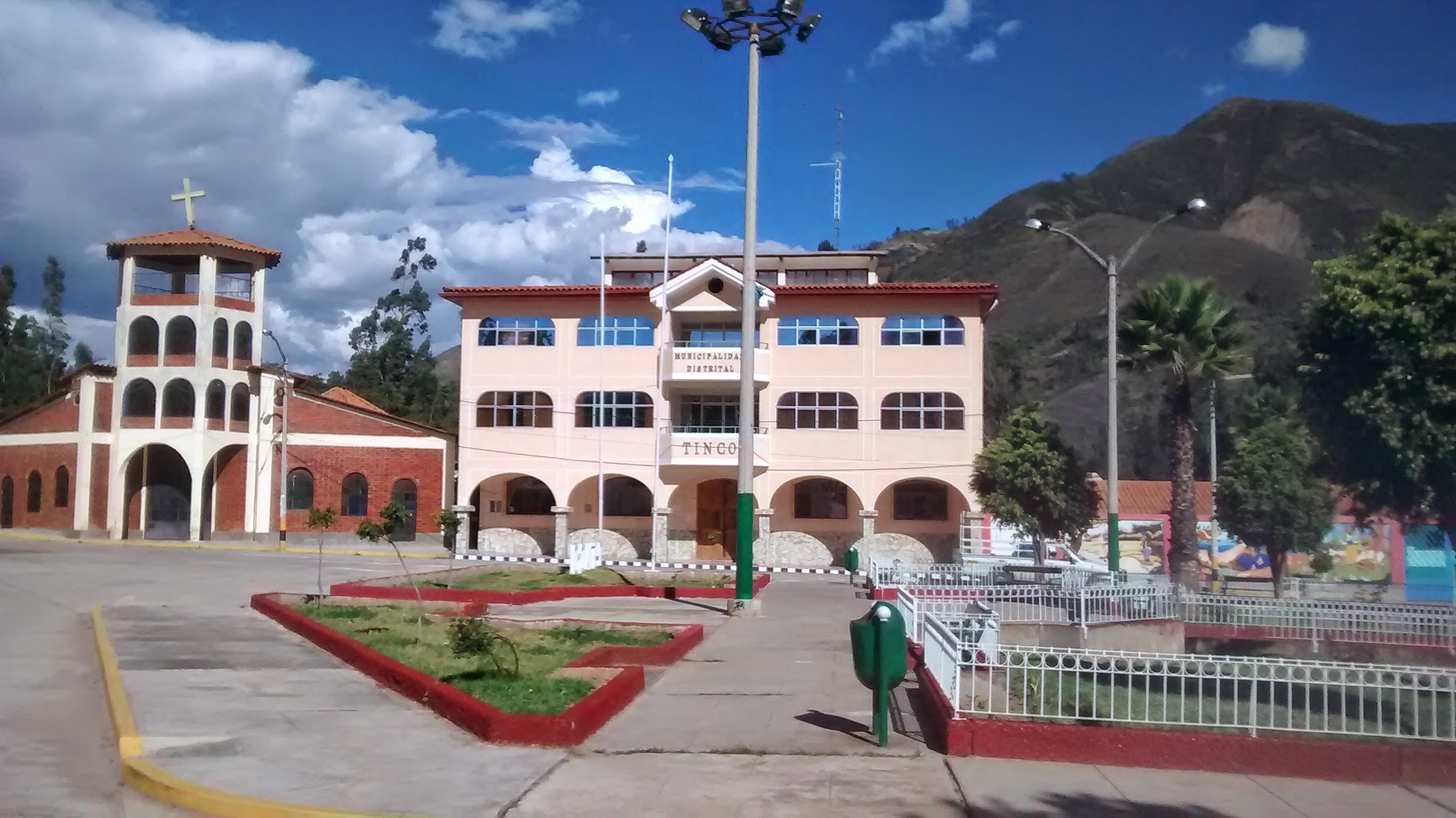 Municipalidad del Distrito de Tinco